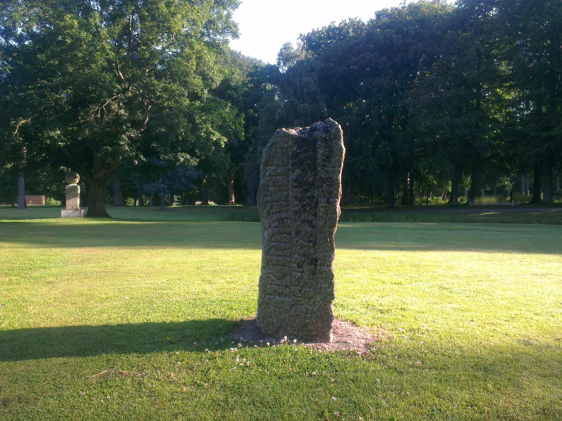 Flemløse-stenen 1 står placeret i Jægerspris Slotspark